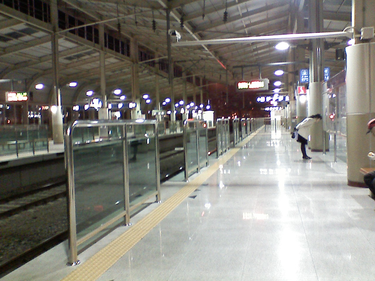 죽전역 승강장 전경